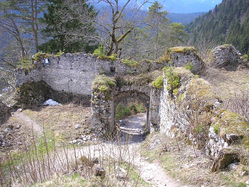 Burg Ehrenberg bei Reutte (Tirol). Die barocke Torbefestigung.